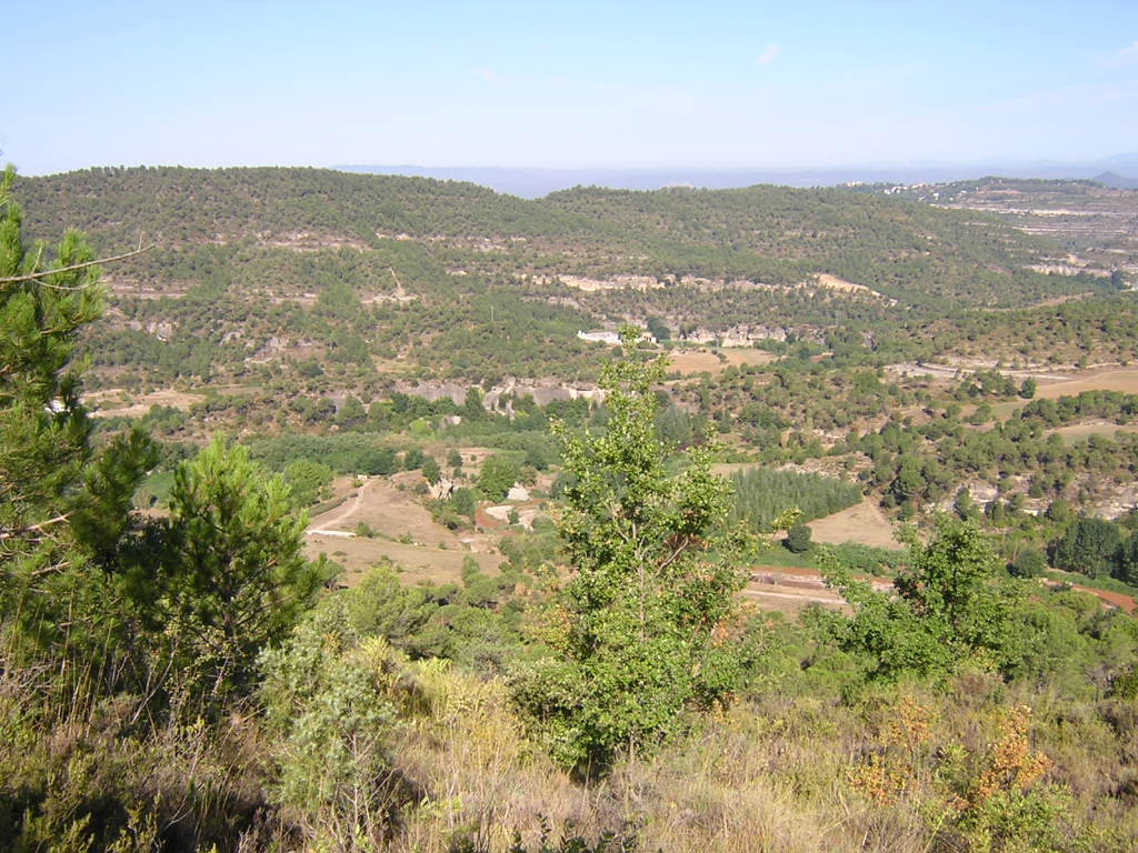 Serrat de les Abrines (Monistrol de Calders, Moianès)